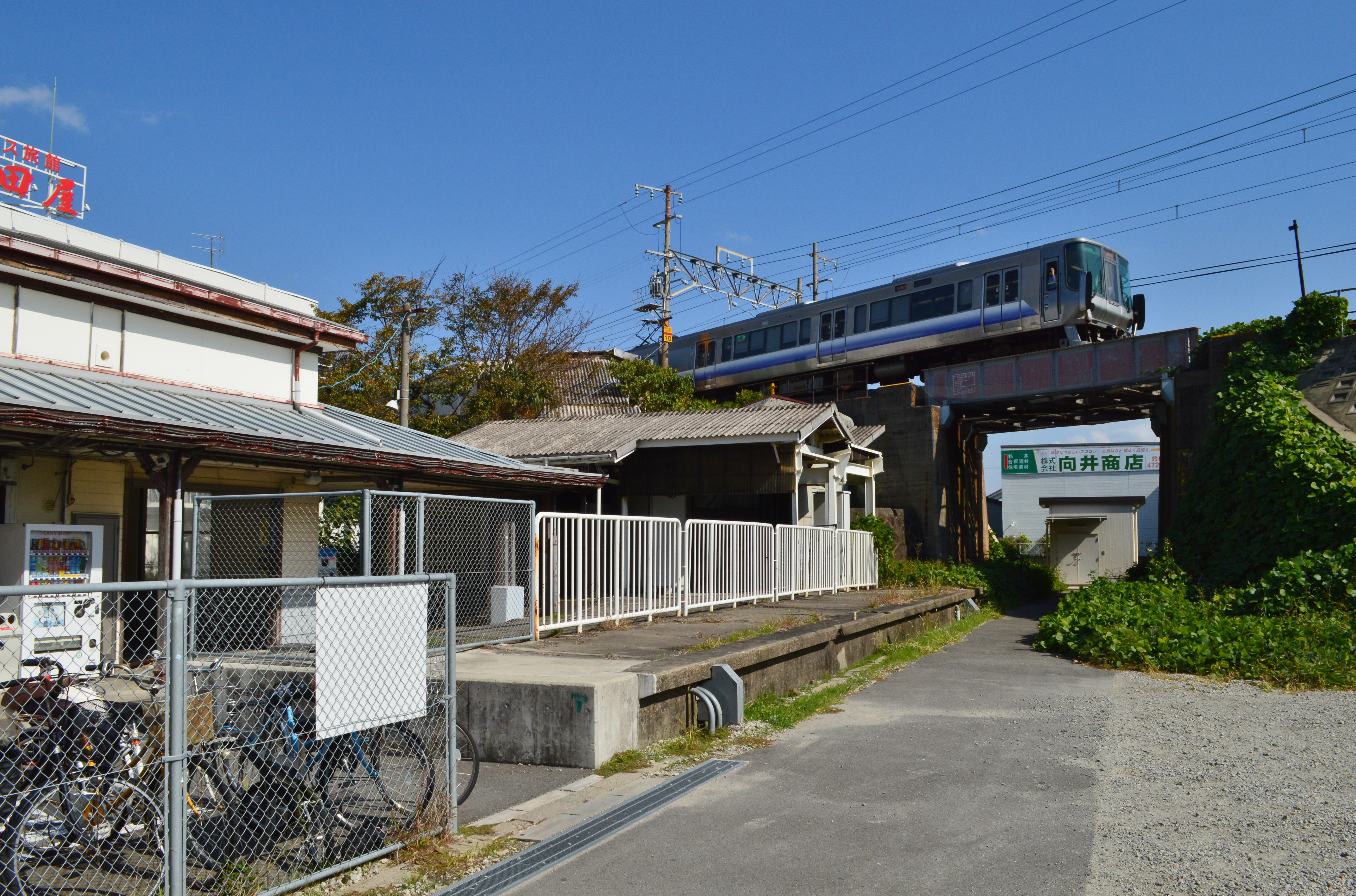 紀伊中ノ島駅 旧和歌山線ホーム